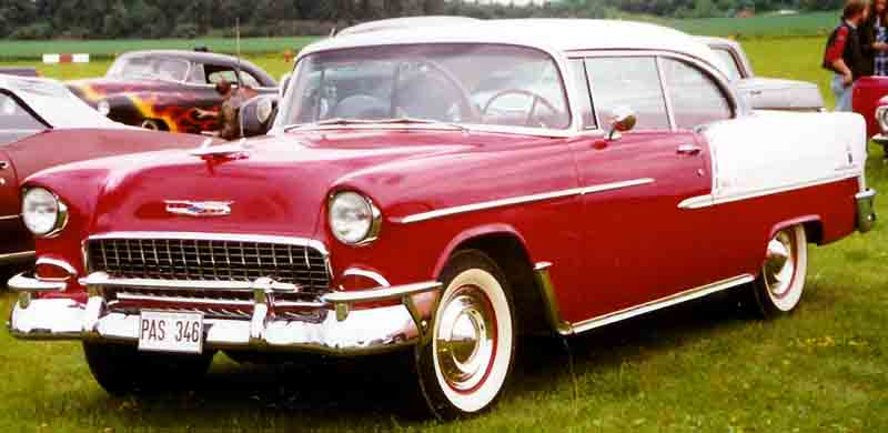 Chevrolet Bel Air 1955